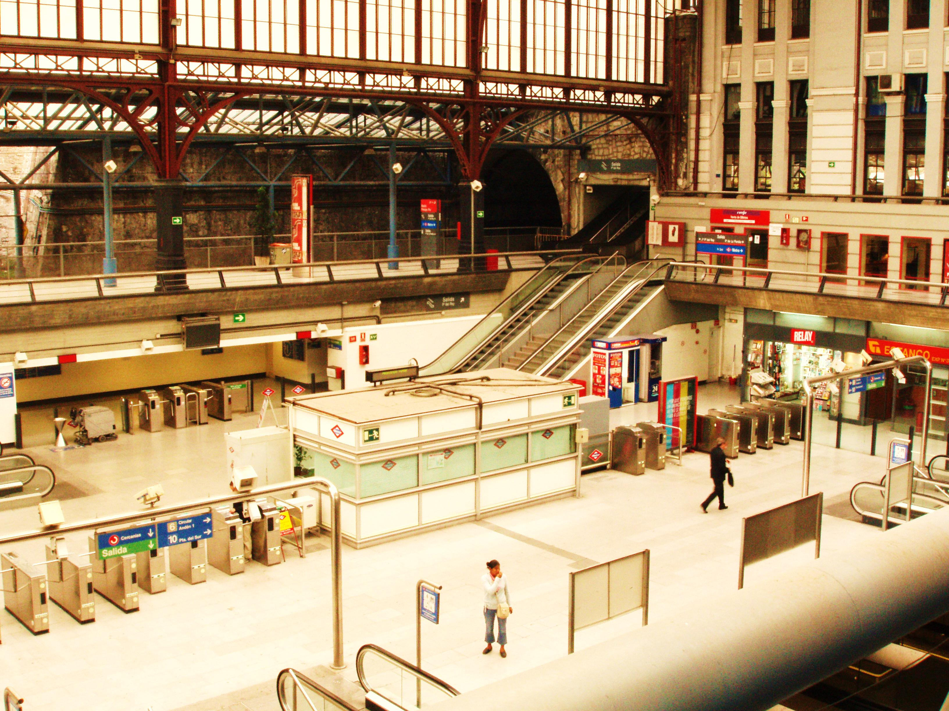 Acceso norte al metro y acceso a Cercanías en la estación madrileña de Príncipe Pío.